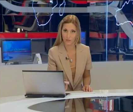 Moldovan TV presenter Nadejda Verbițcaia